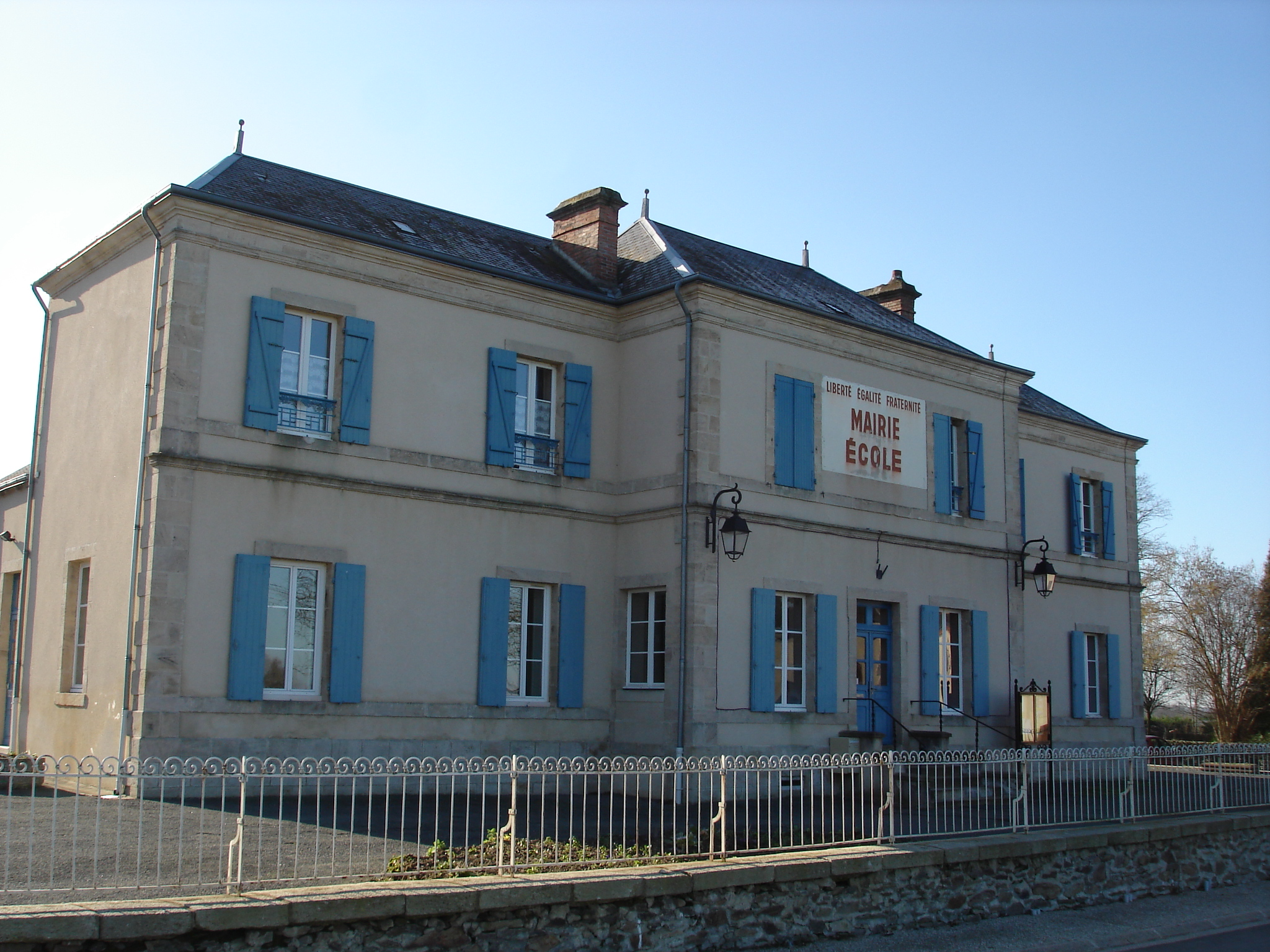 Pérassay (36) : La mairie.